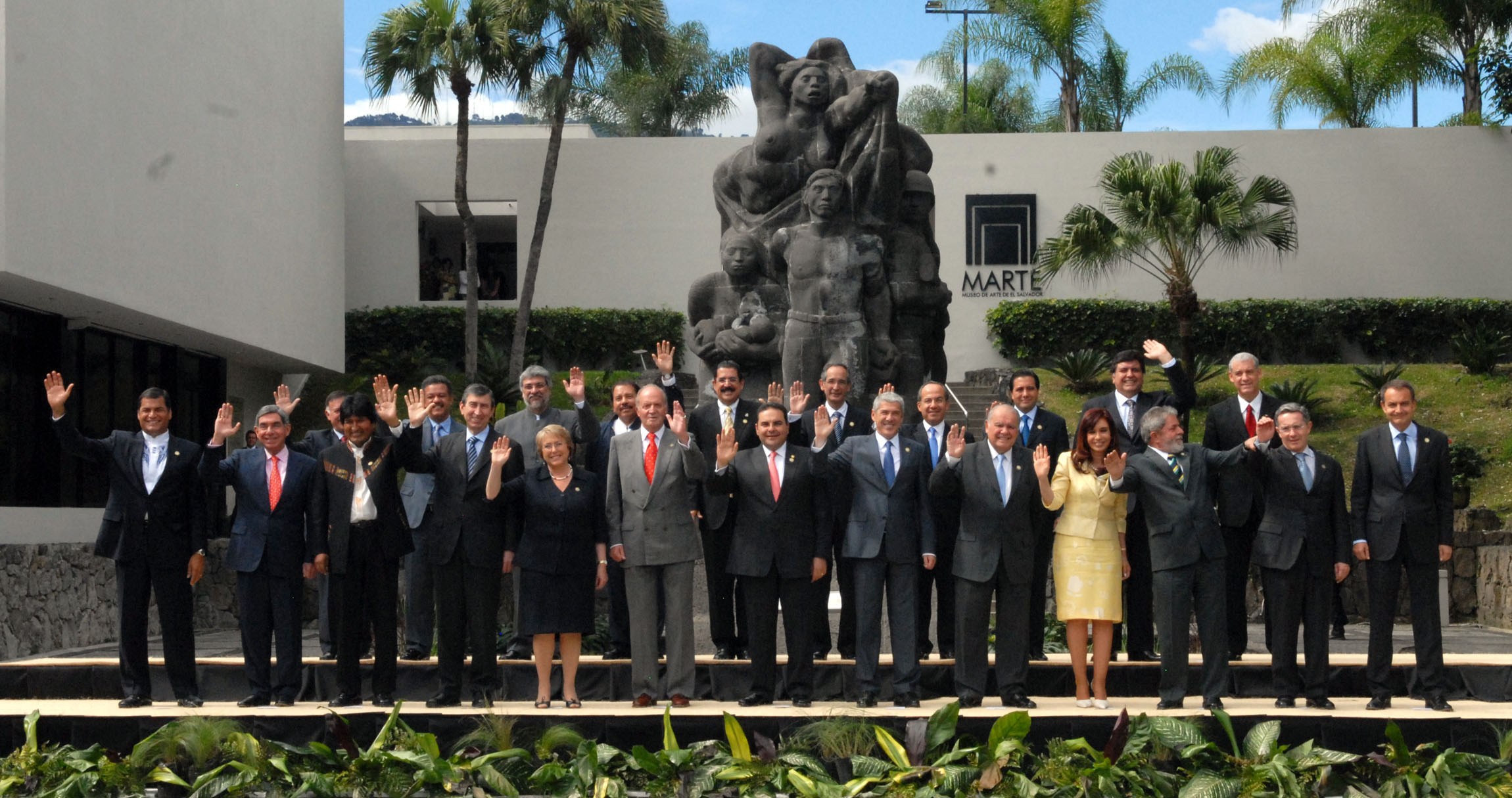 Los presidentes asistentes a la XVIII Cumbre Iberoamericana.